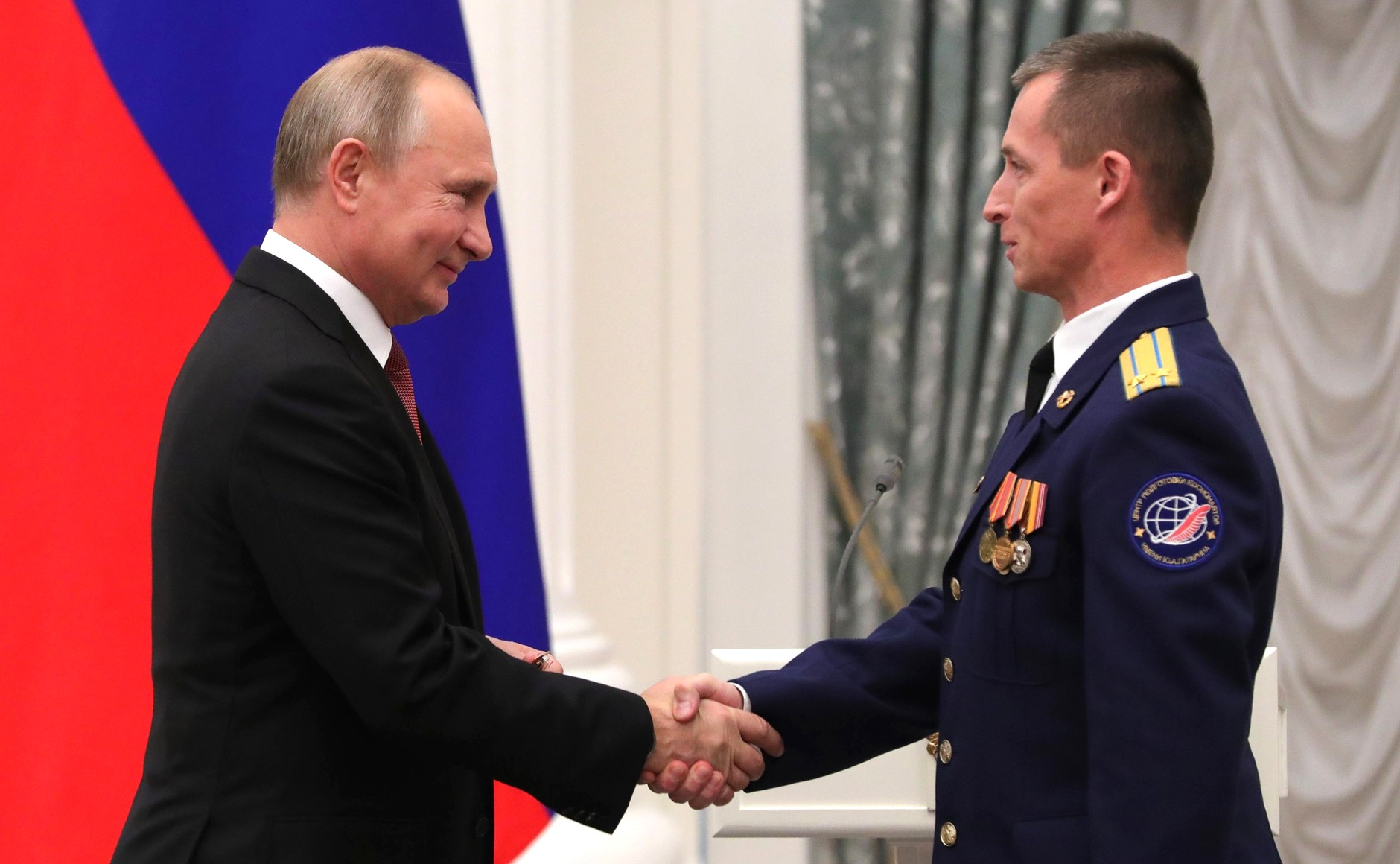 Звание Героя Российской Федерации и почётное звание «Лётчик-космонавт Российской Федерации» присвоено космонавту-испытателю Сергею Рыжикову.